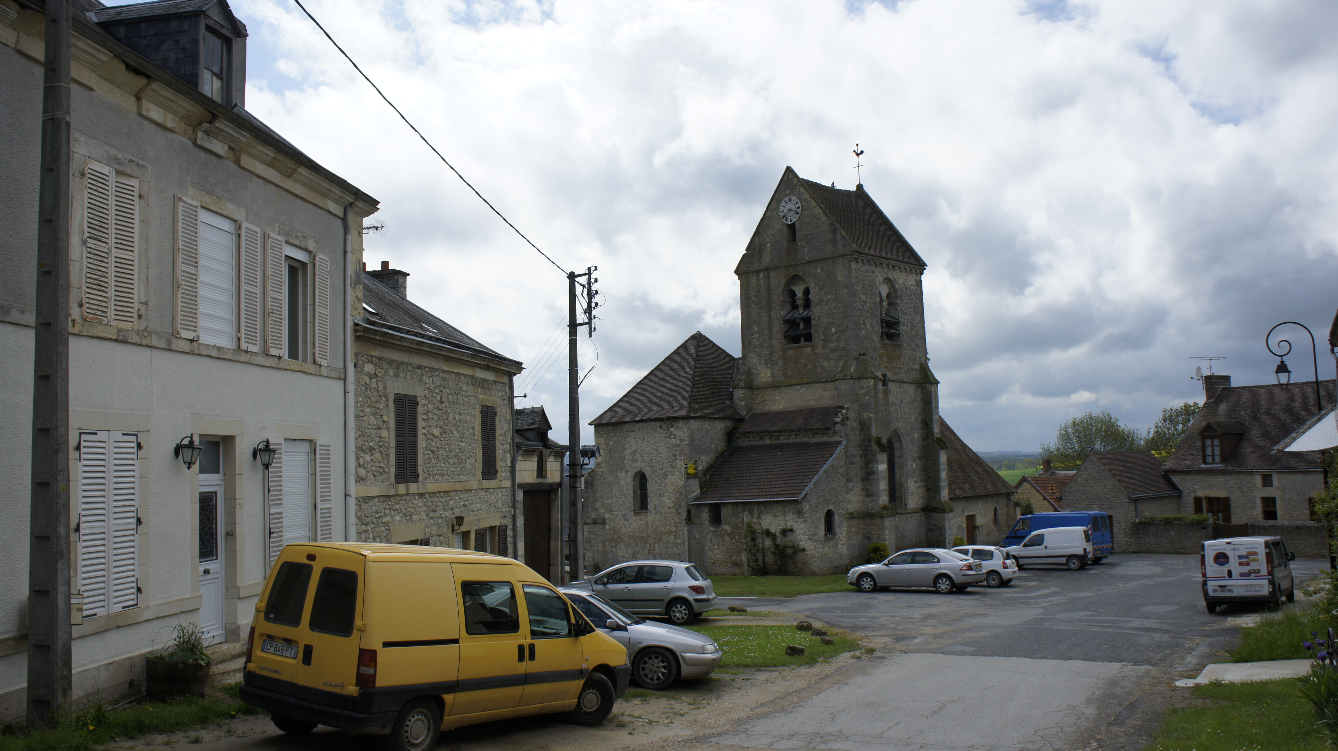 La place de l'église .